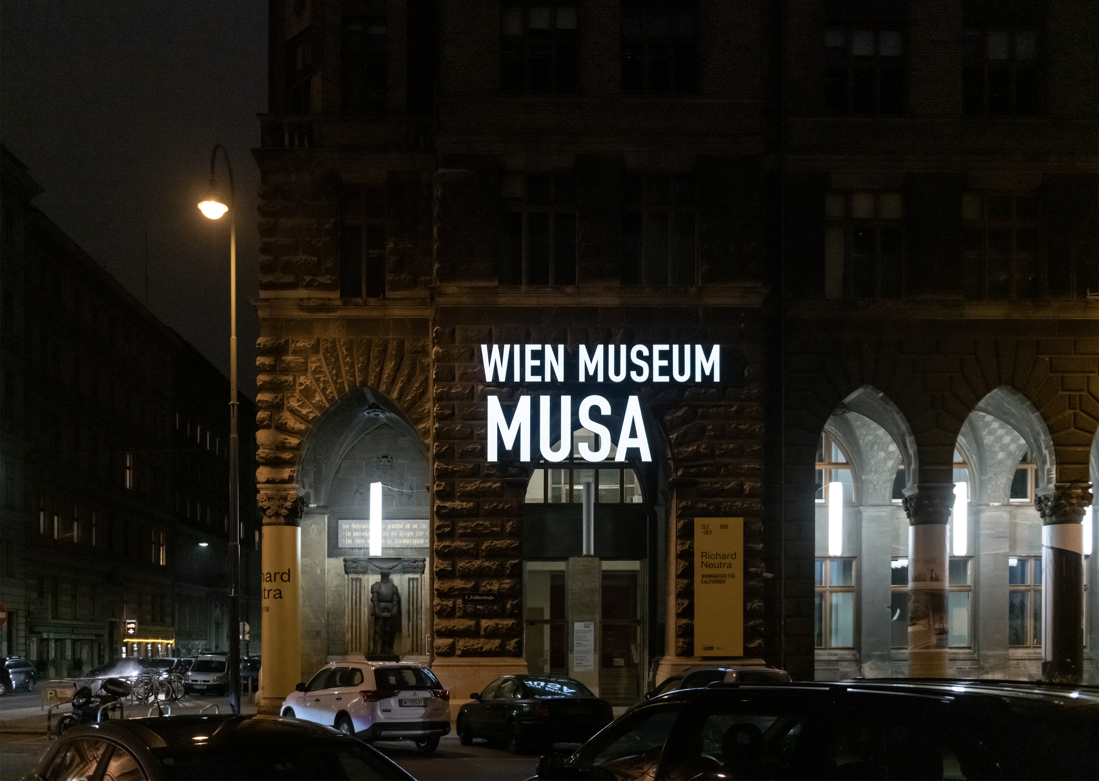 Das denkmalgeschützte Amtsgebäude in der Rathausstraße 14-16 in Wien, Österreich, mit dem MUSA (Museum auf Abruf) des Wien Museums; links der Wehrmann in Eisen.